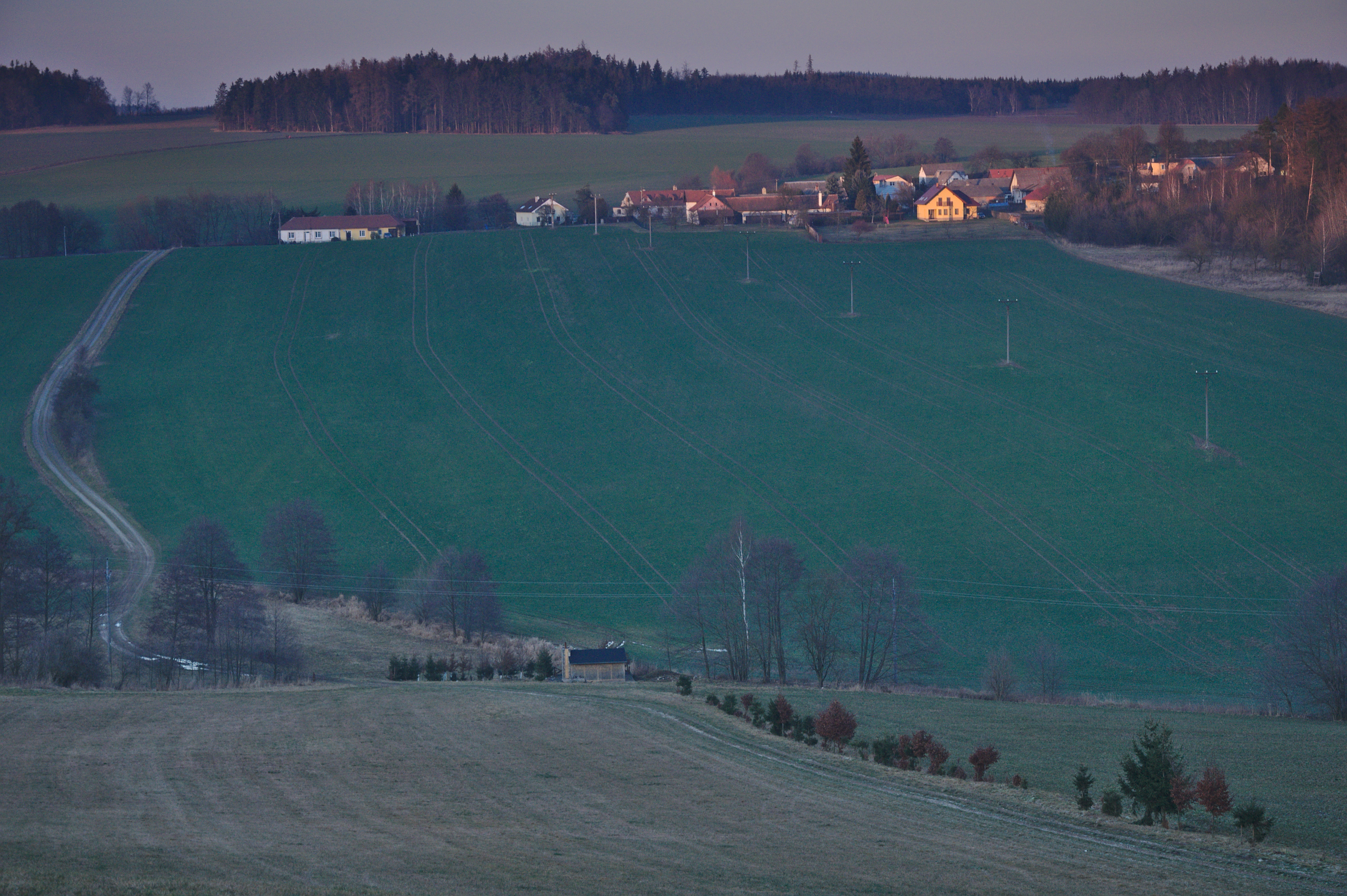 Pohled na obec od jihu, Dětkovice, Ludmírov, okres Prostějov